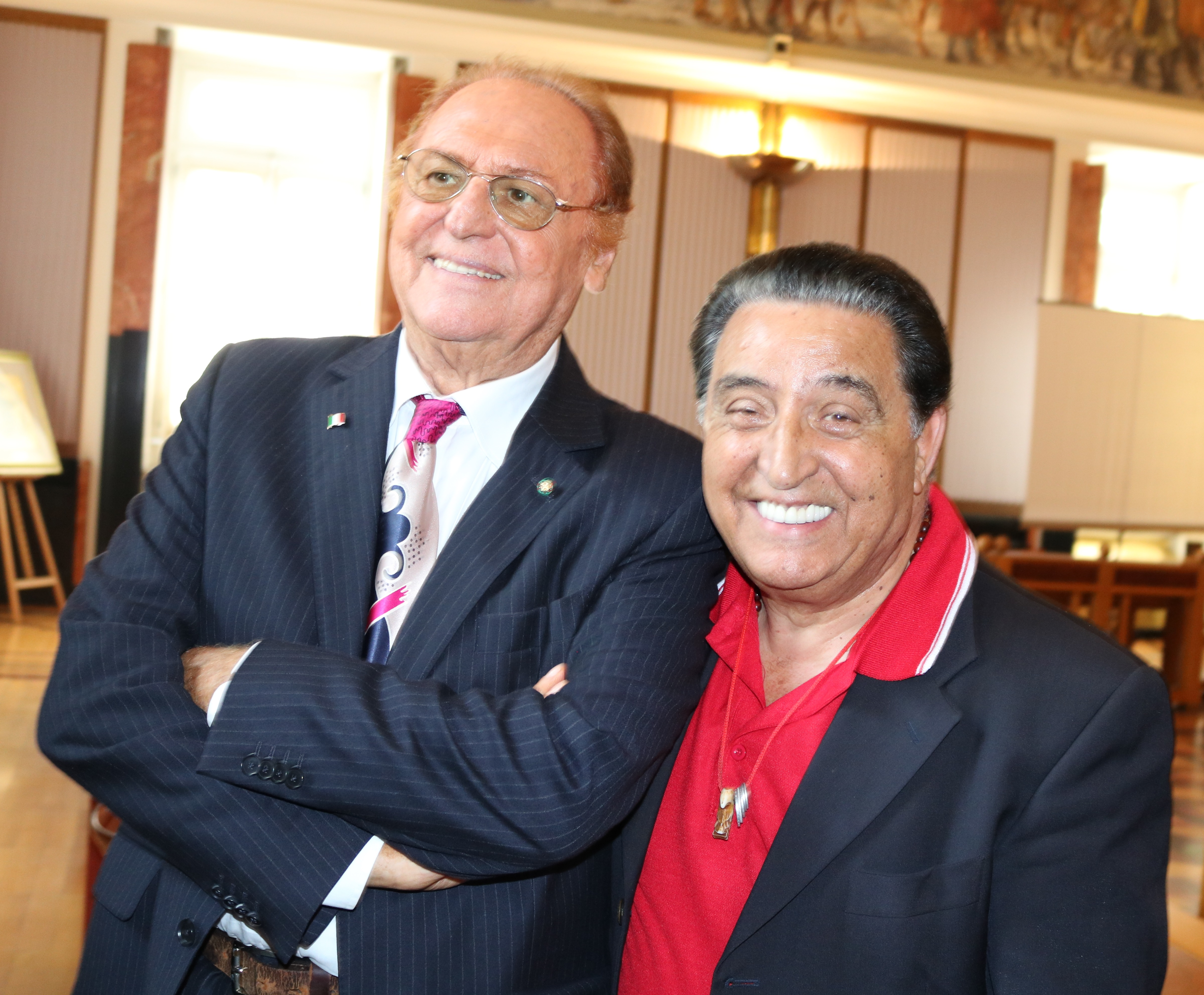 Renzo Arbore e Mario Trevi. Foto scattata il 5 Aprile 2017 all'Università Federico II di Napoli, all'assegnazione della Laurea honoris causa alla memoria in “Discipline della Musica e dello Spettacolo. Storia e Teoria” al Principe Antonio De Curtis in arte Totò. foto: Salvatore Architravo